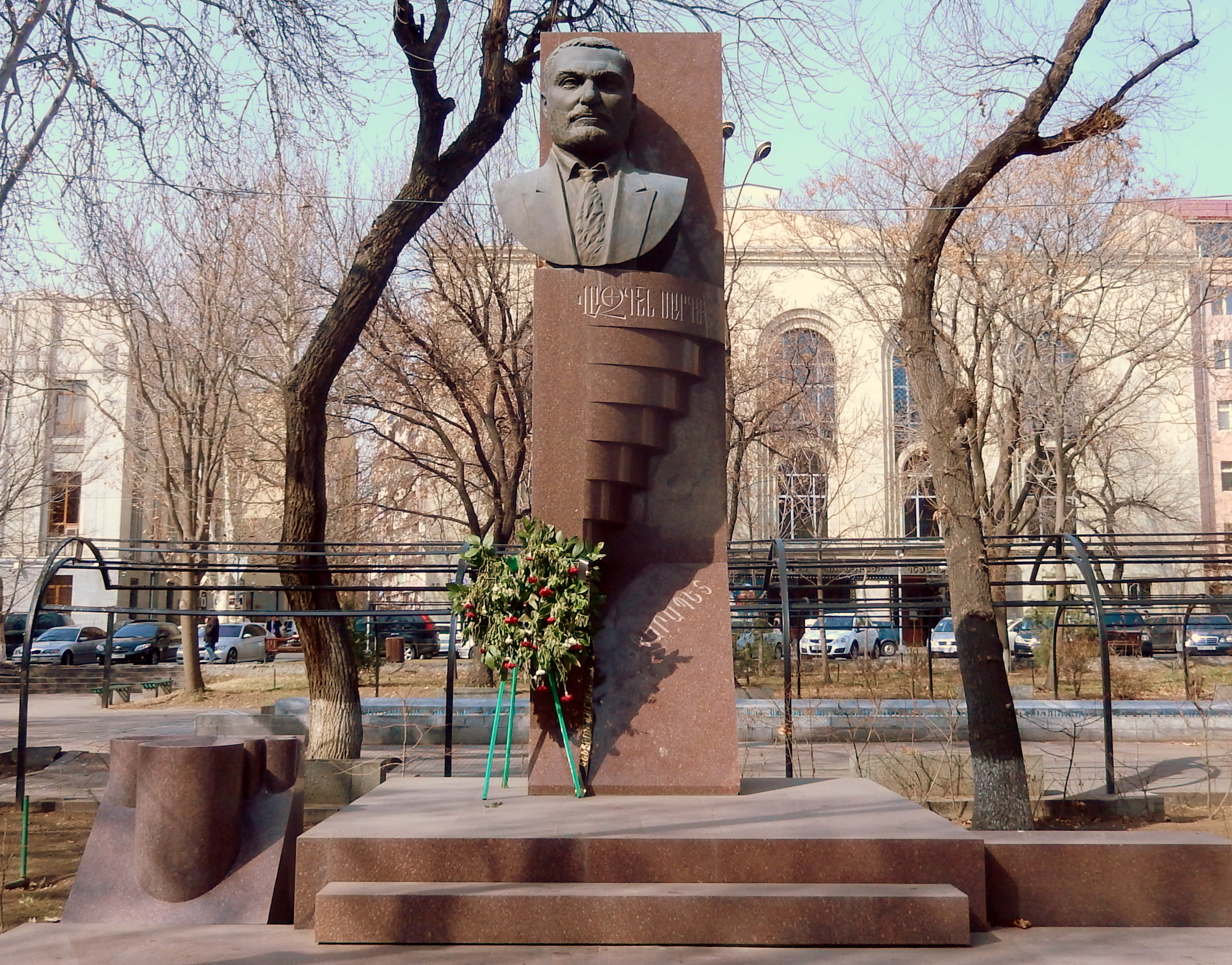 Քանդակագործ` Տիգրան Հովումյան, ճարտարապետ` Ասլան Մխիթարյան